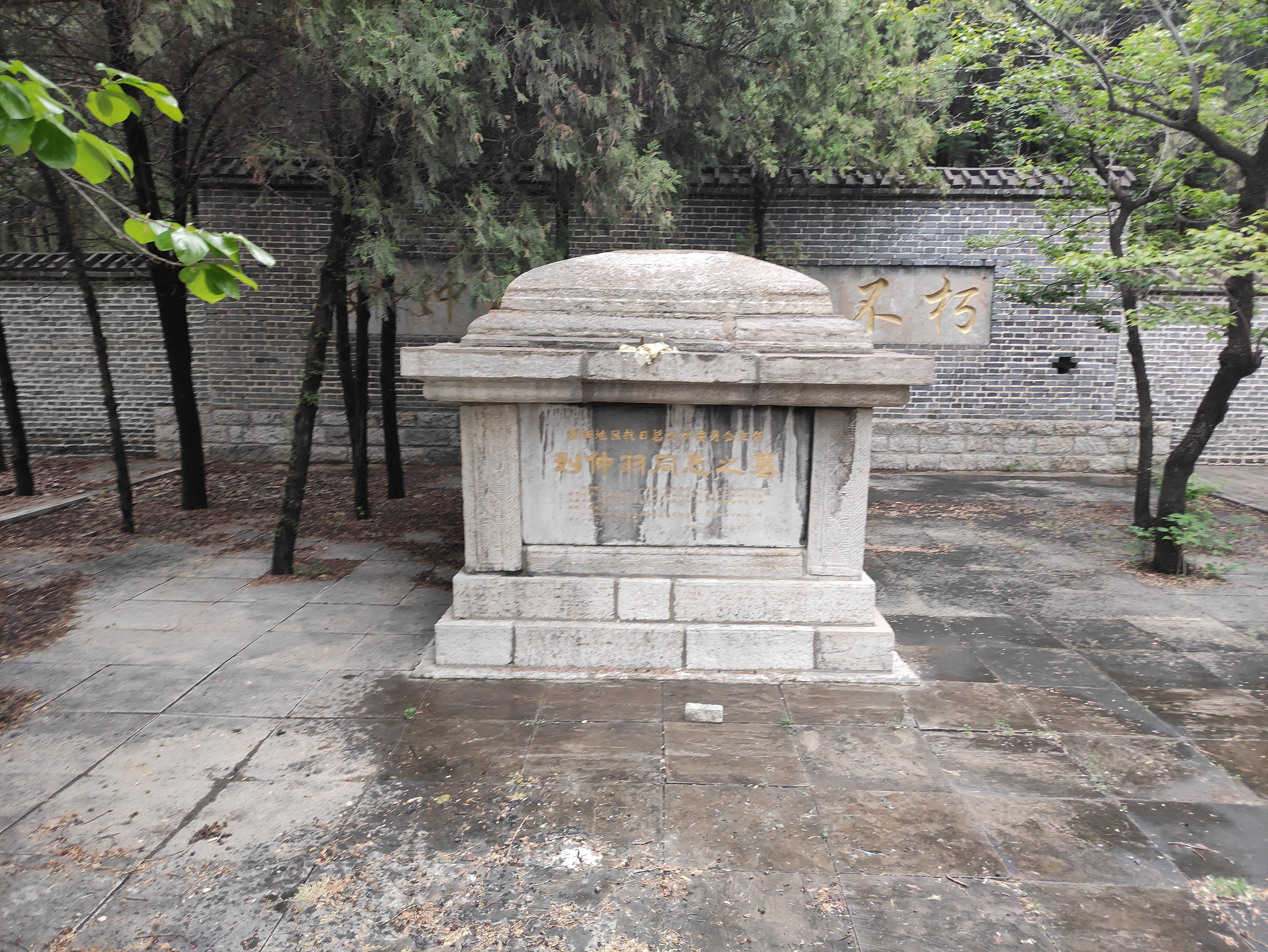 刘仲羽烈士墓，系东平县县级文物保护单位